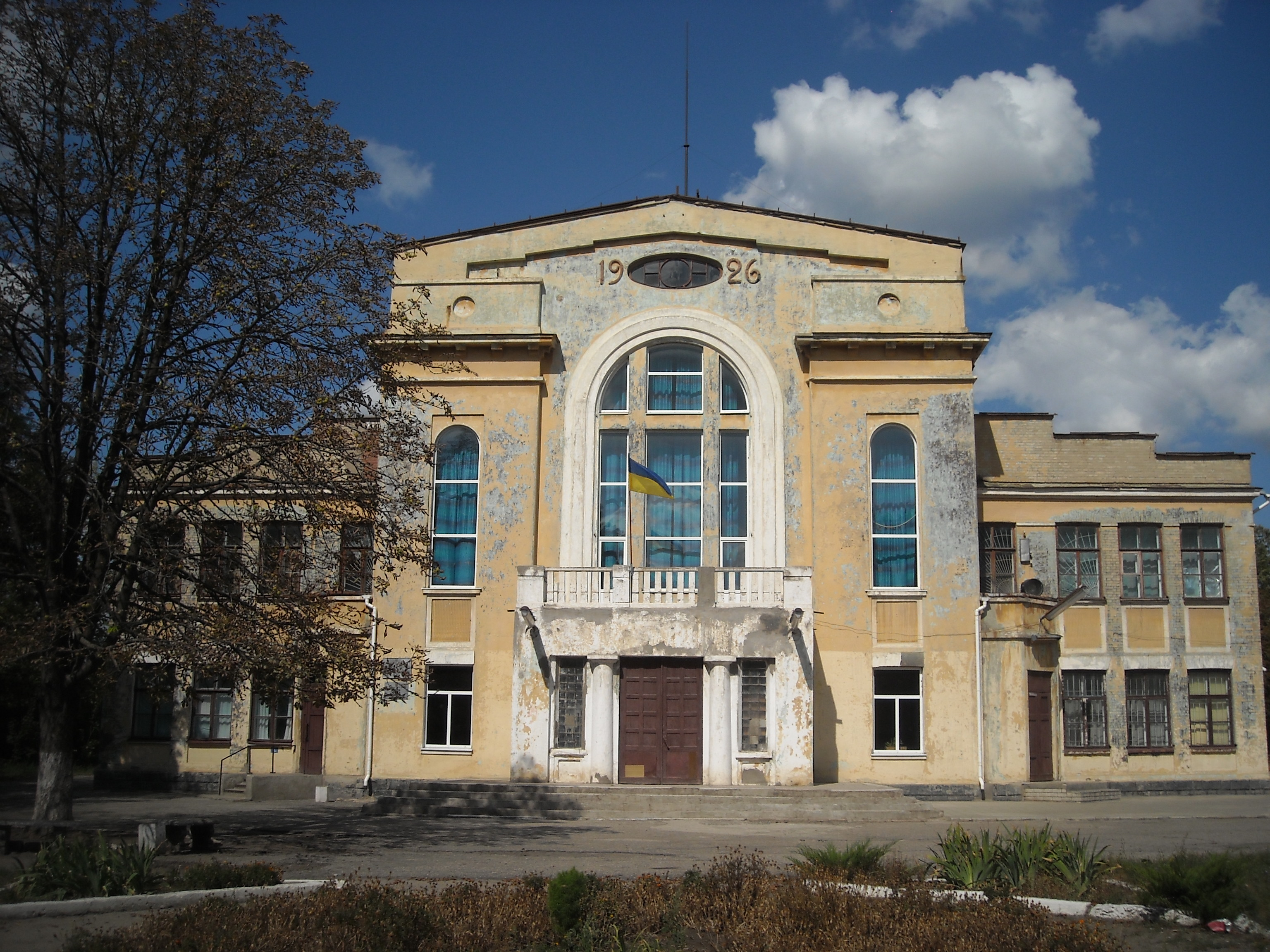 Робітничий клуб тепловозоремонтного заводу (сучасне використання — будинок культури), Ізюм, вулиця Заводська, 3